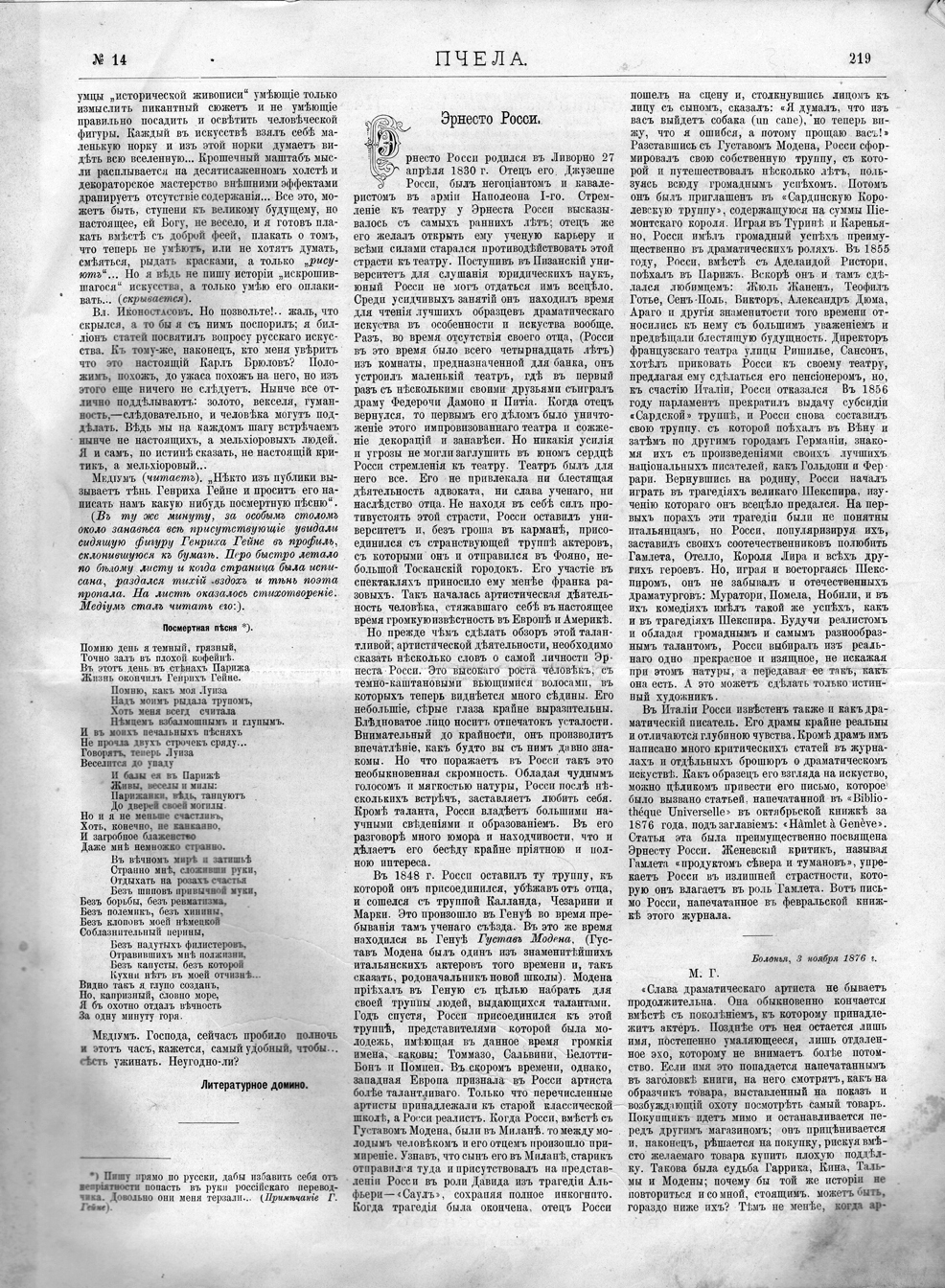 Статья А. Н. Якоби (Пешковой-Толиверовой) "Эрнесто Росси" в журнале "Пчела", 1877 год, № 14, стр. 219-223; фельетон "Воскресные сеансы. Дневник духовидца", Дмитрия Минаева